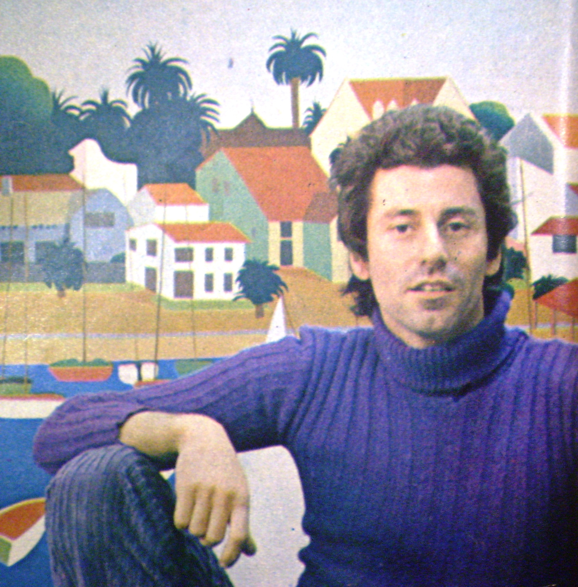 Nicolás García Uriburu